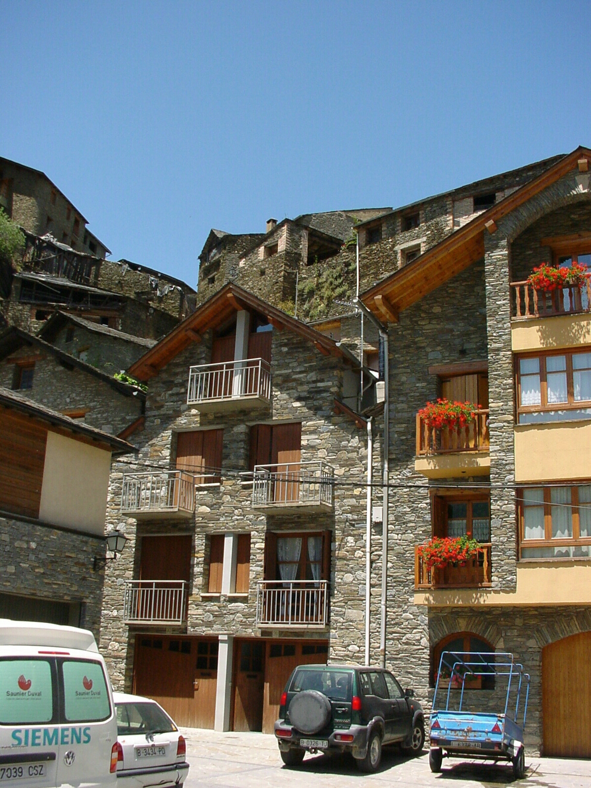 La Noguera Ansicht